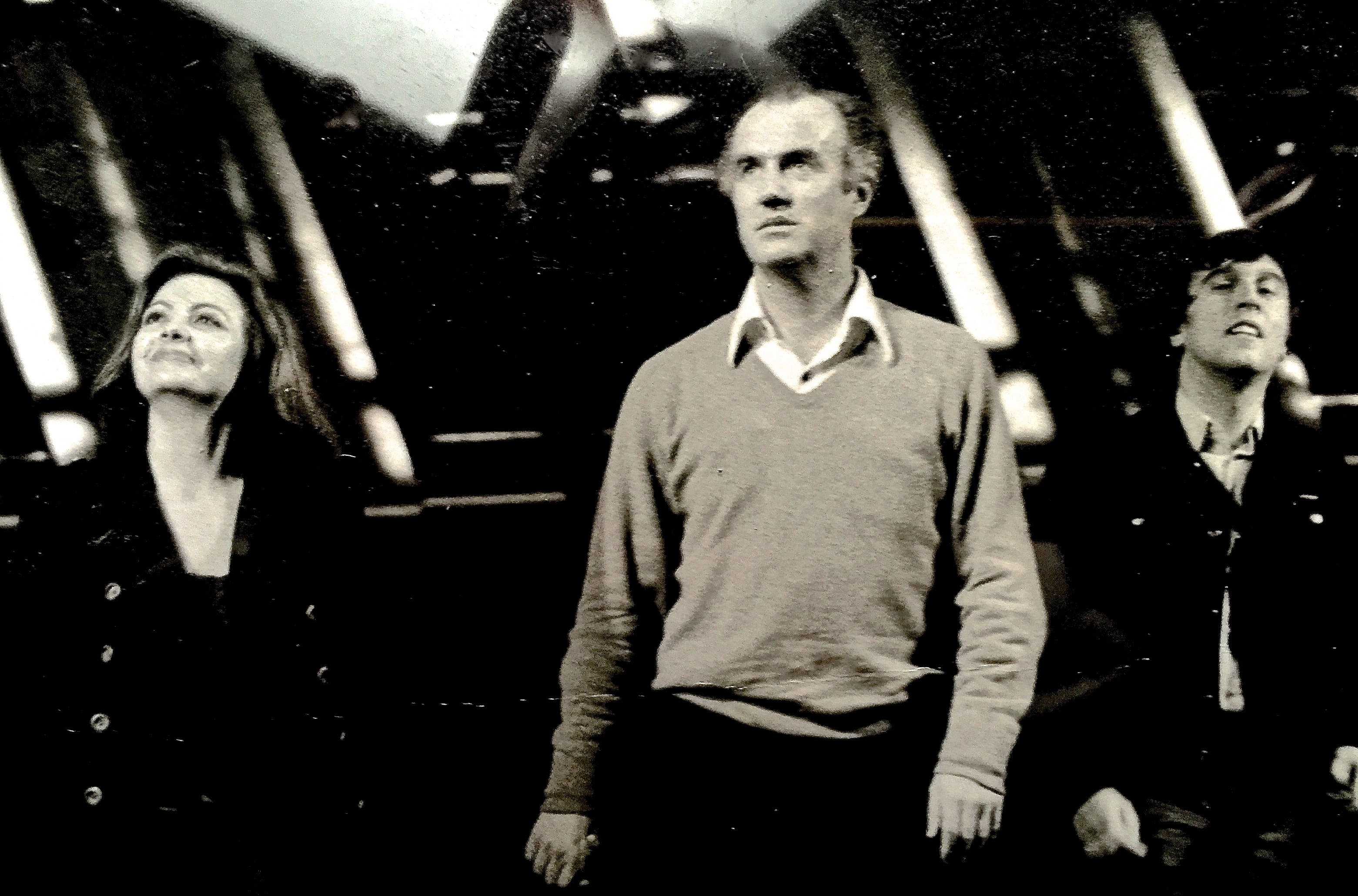 Foto scattata durante una performance nel 1975